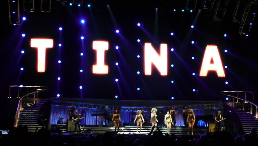 Concierto de Tina Turner.